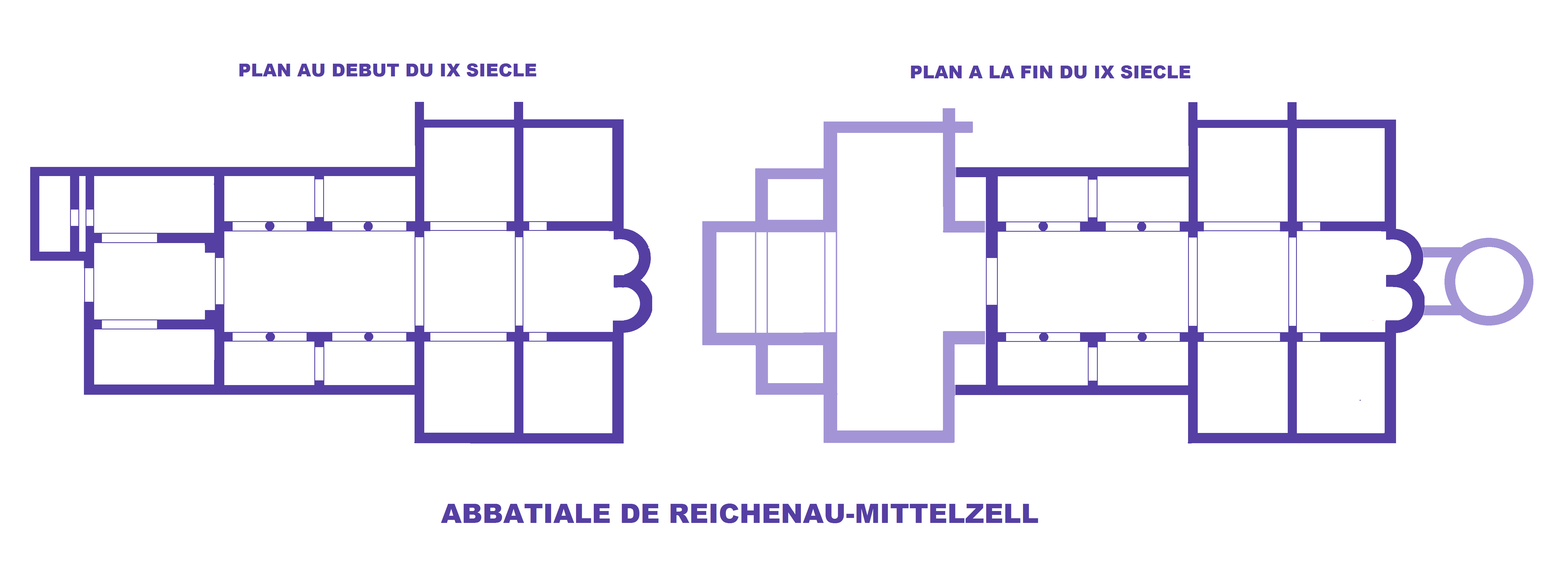 Abbaye de Richenau-Mittelzell, Plans au début et à la fin du IXe siècle